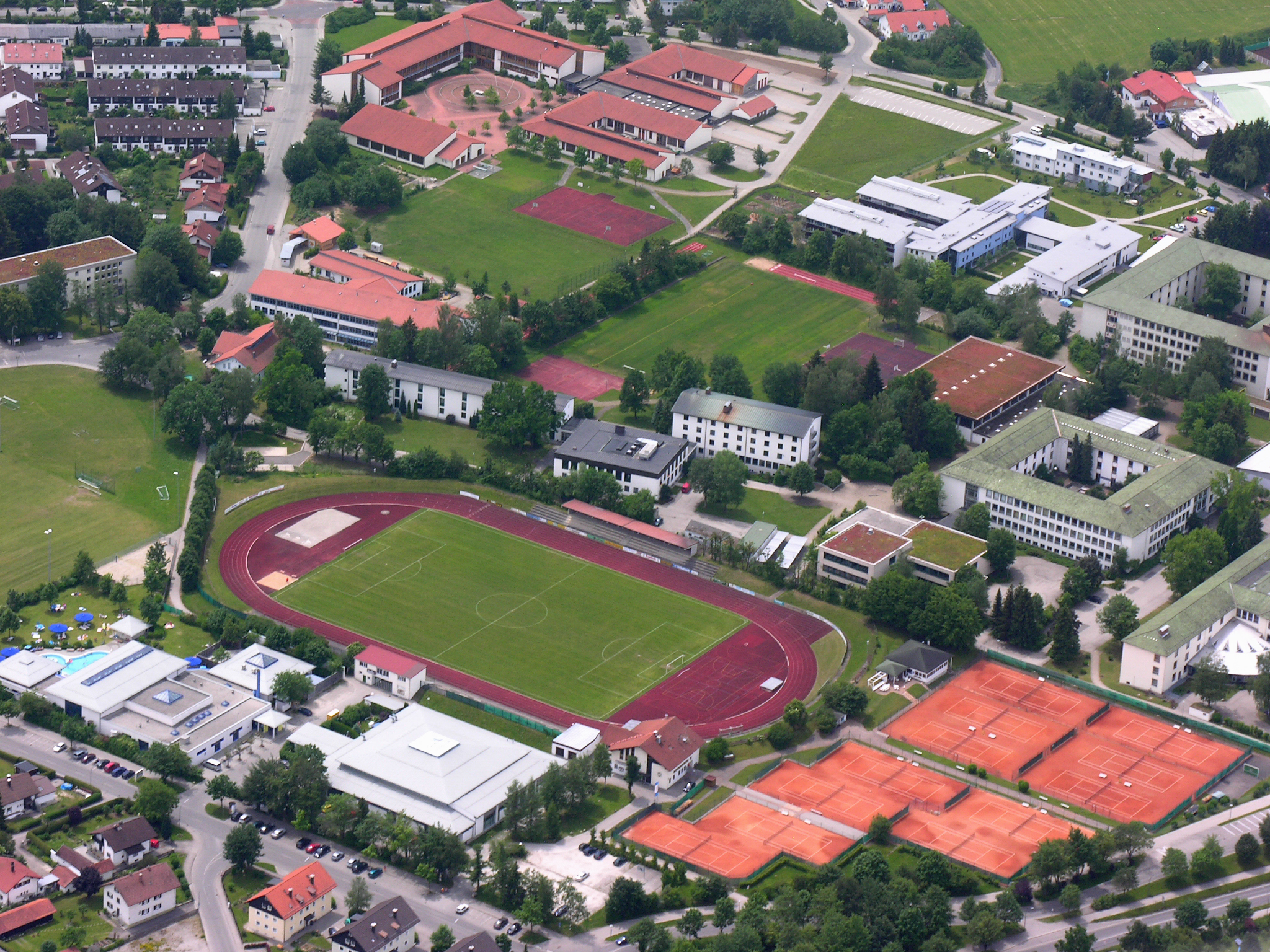 Germany, Bavaria, Marktoberdorf mit Sportplätzen, Berufsschule, Gymnasium und Internat.